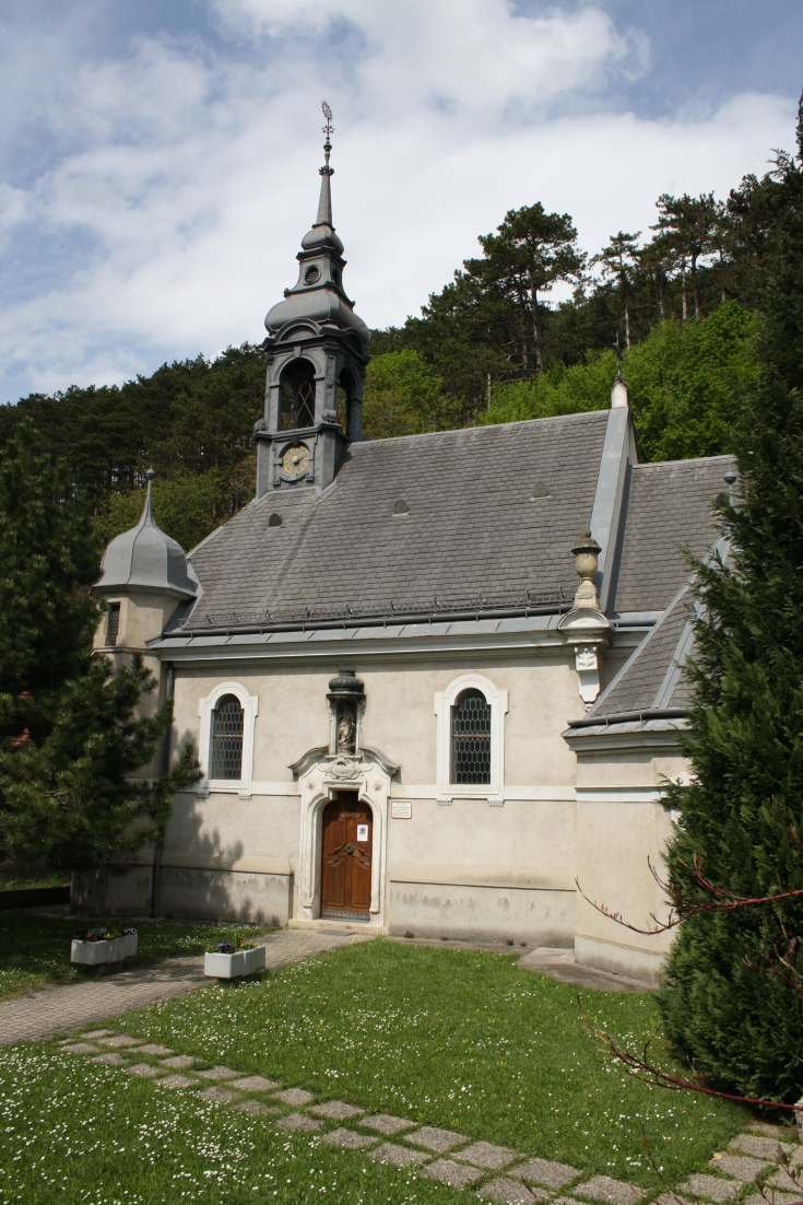 Filialkirche zur hl. Katharina in Fahrafeld, einer Ortschaft der niederöstereichischen Gemeinde Pottenstein